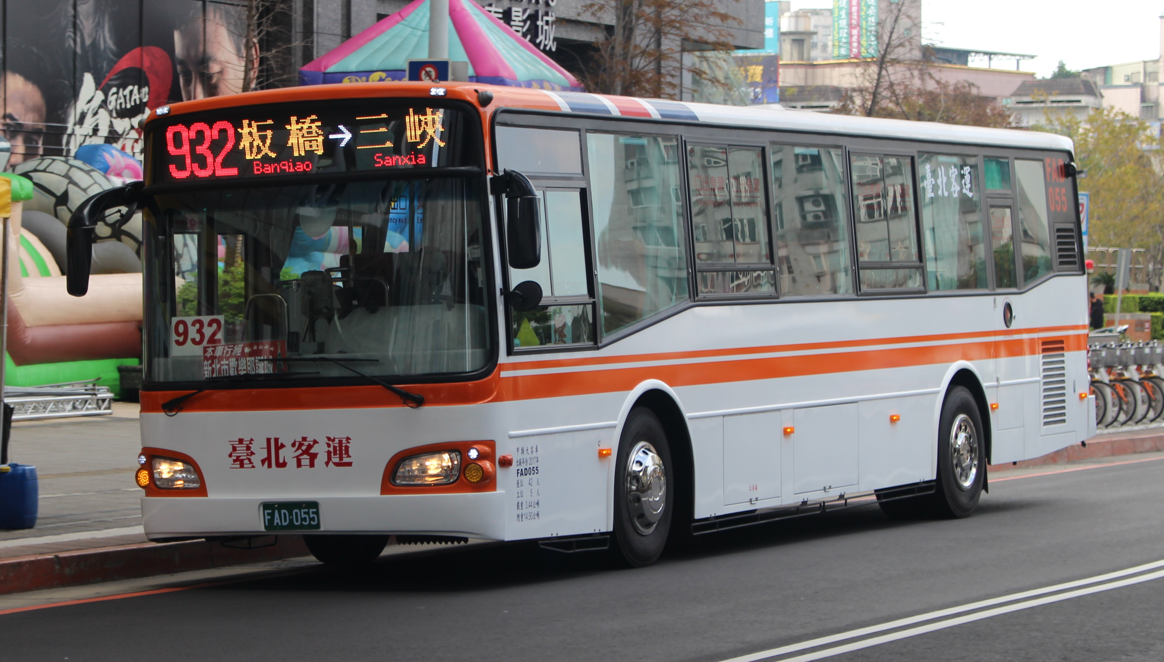 臺北客運FAD-055行駛新北市市區公車932線